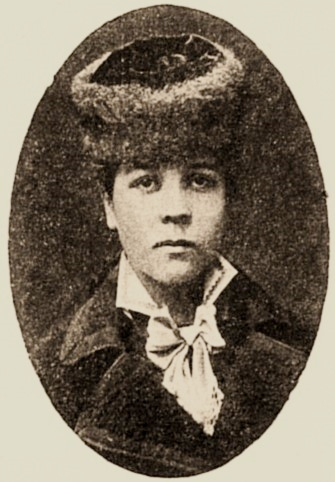 Marija Gerasimovna Nikol'skaja, moglie di Valerian Osinskij